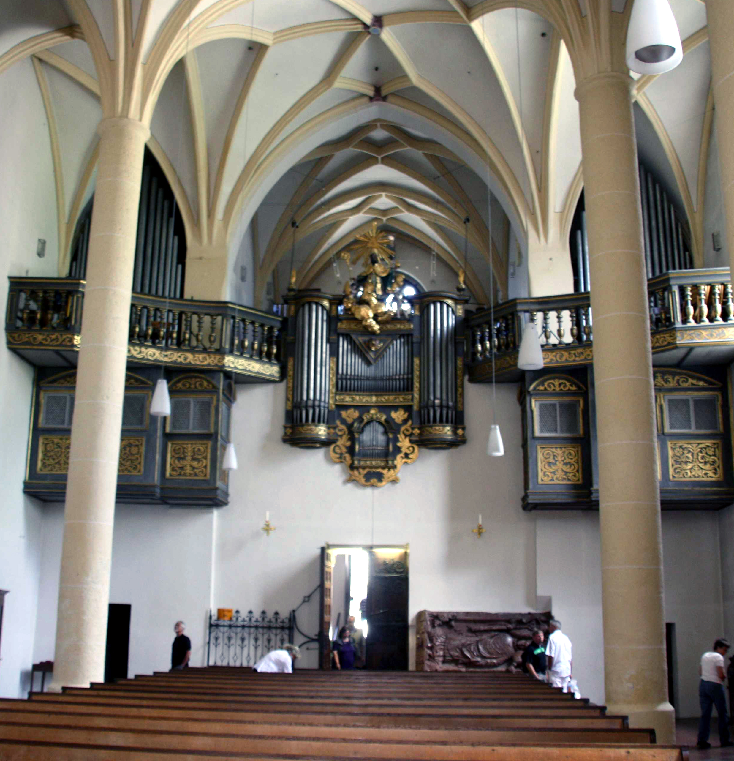 Die Orgel der Stiftskirche von Berchtesgaden